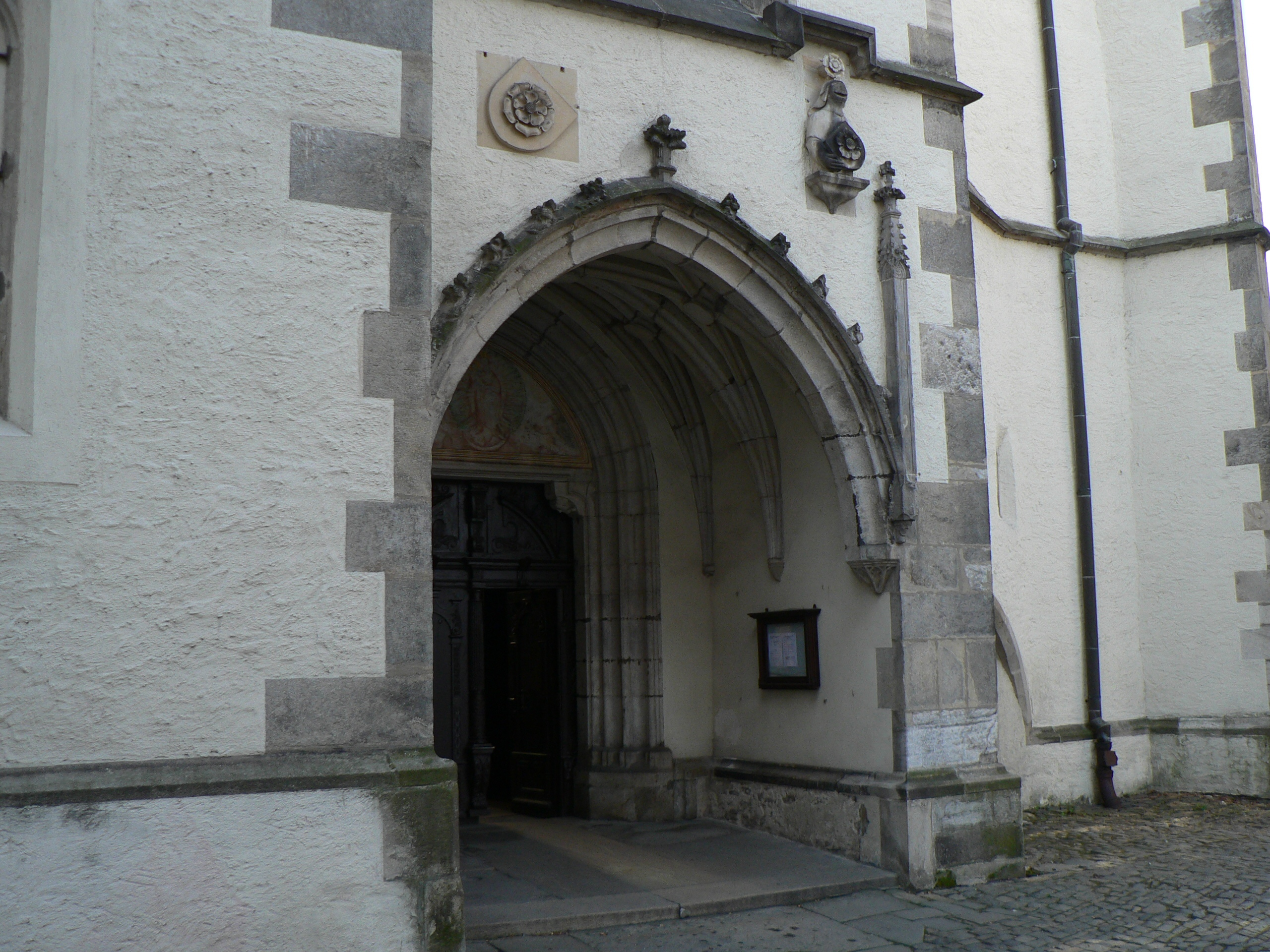 Kostel svatého Víta (Český Krumlov) - předsíň se vstupním portálem